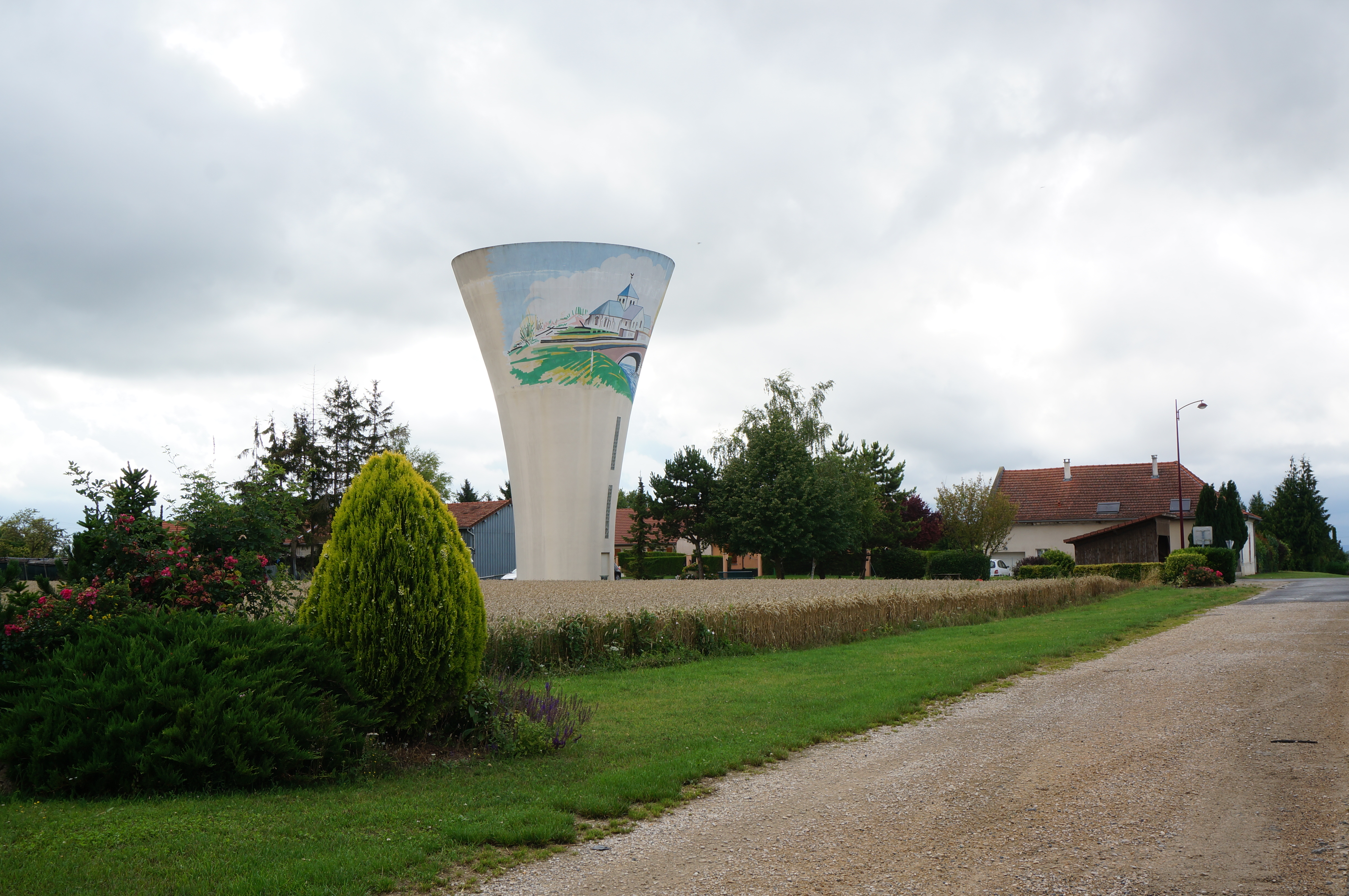 vue du Château d'eau de Matougue .